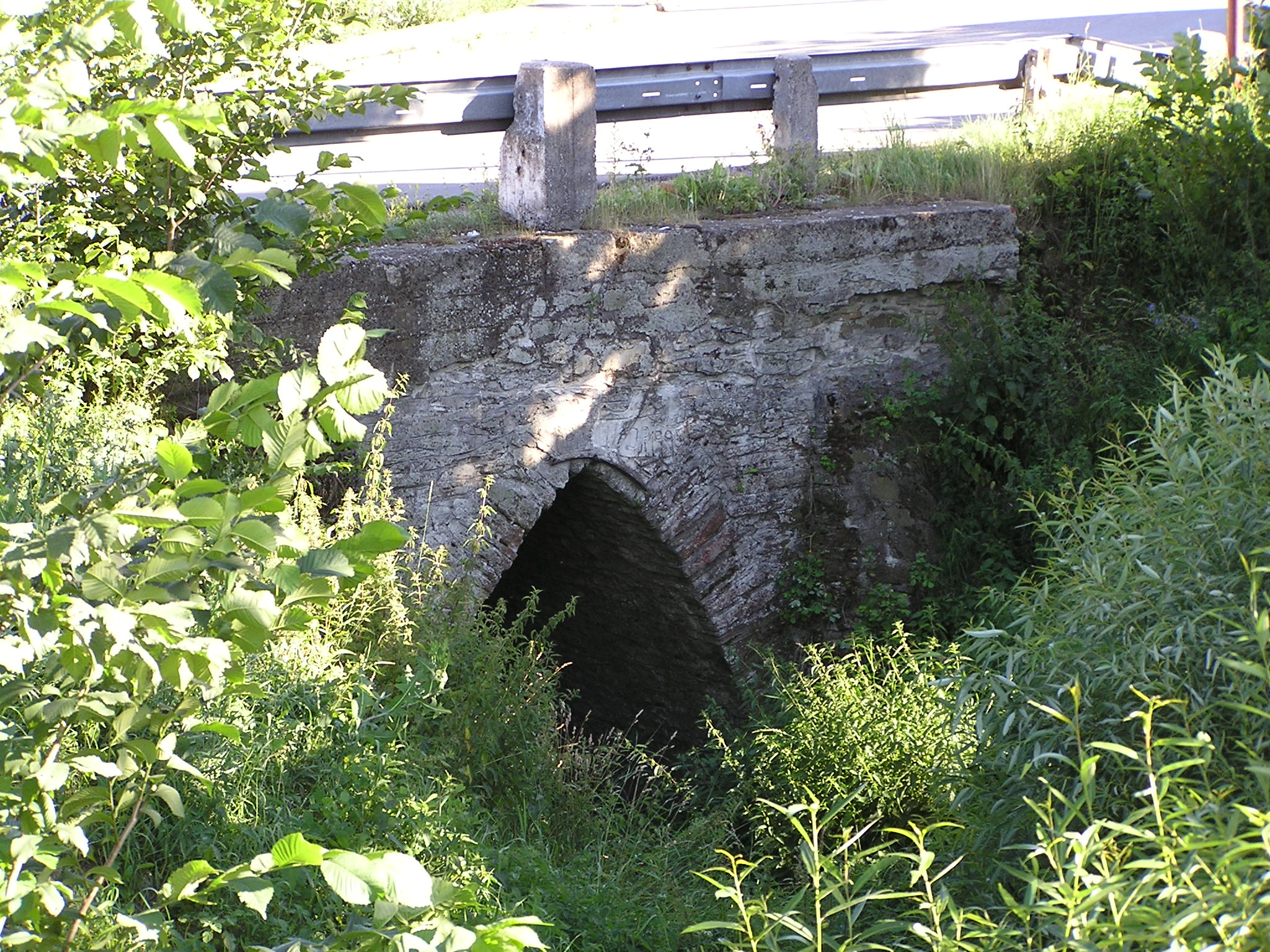 Most cestný, Dravce